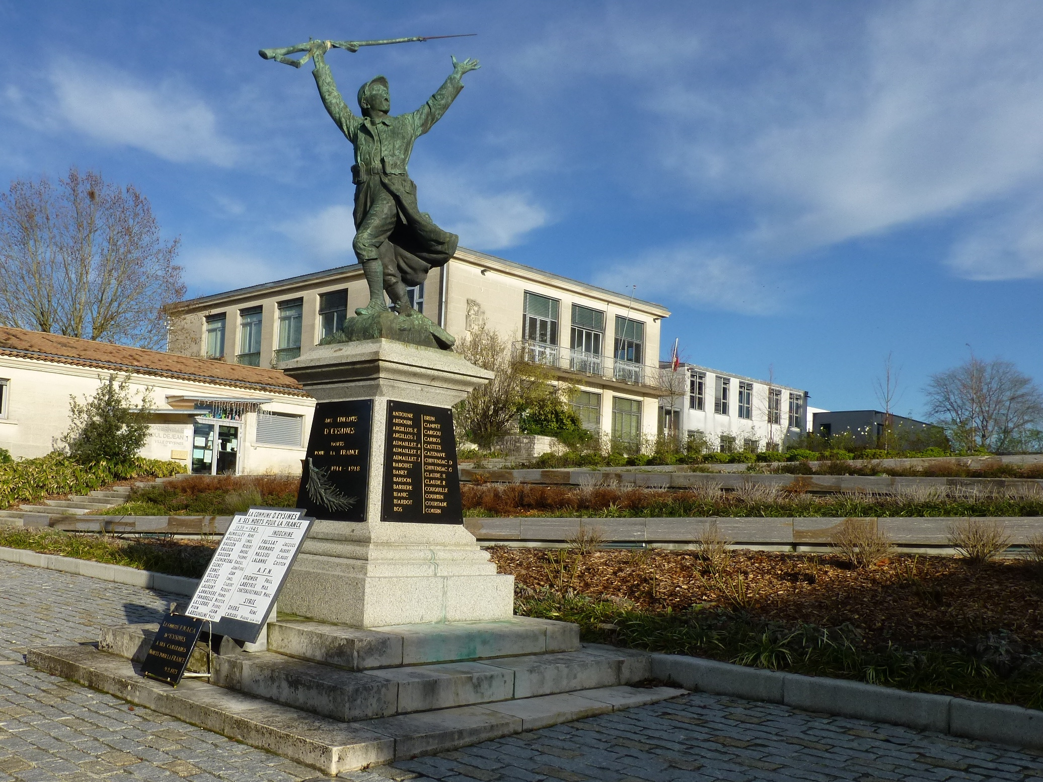 Eysines, Parvis de l'église : monument aux morts (1921, Chrétien), mairie et écoles.